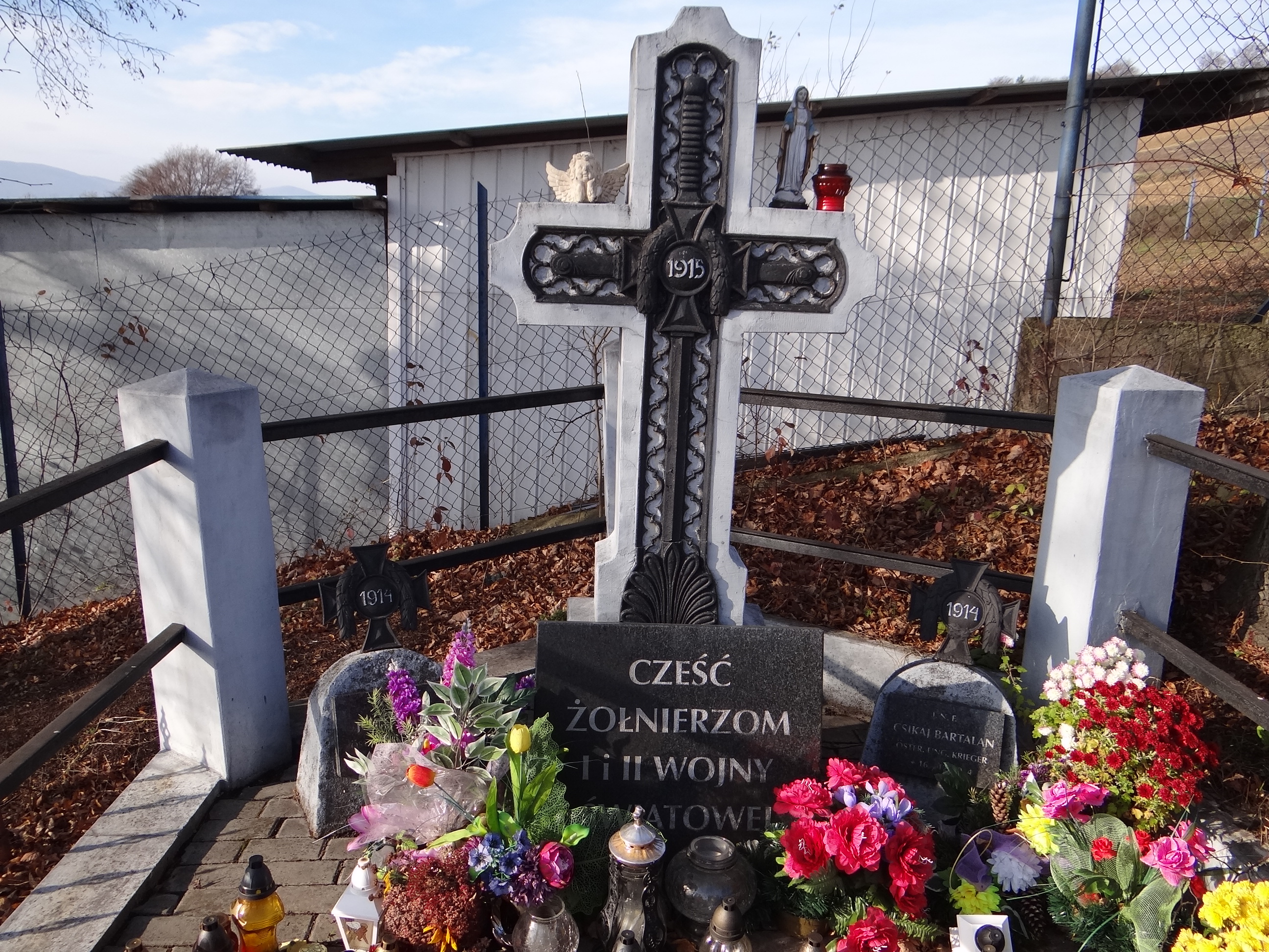 Cmentarz wojenny nr 354 - Sienna